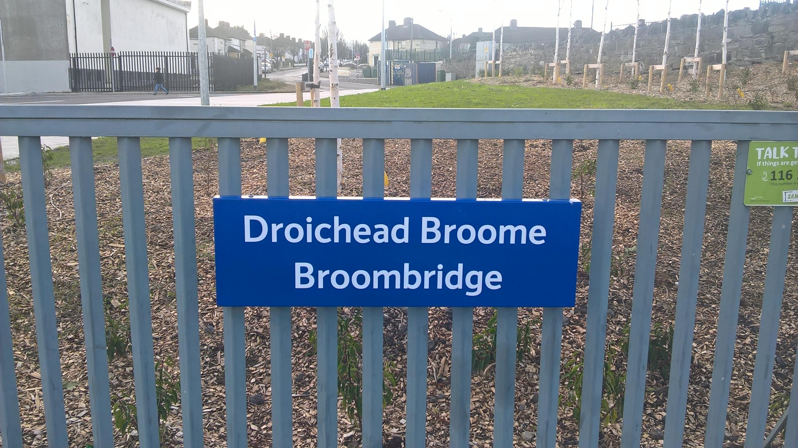 Comhartha dhátheangach Stáisiún Traenach Droichead Broome.